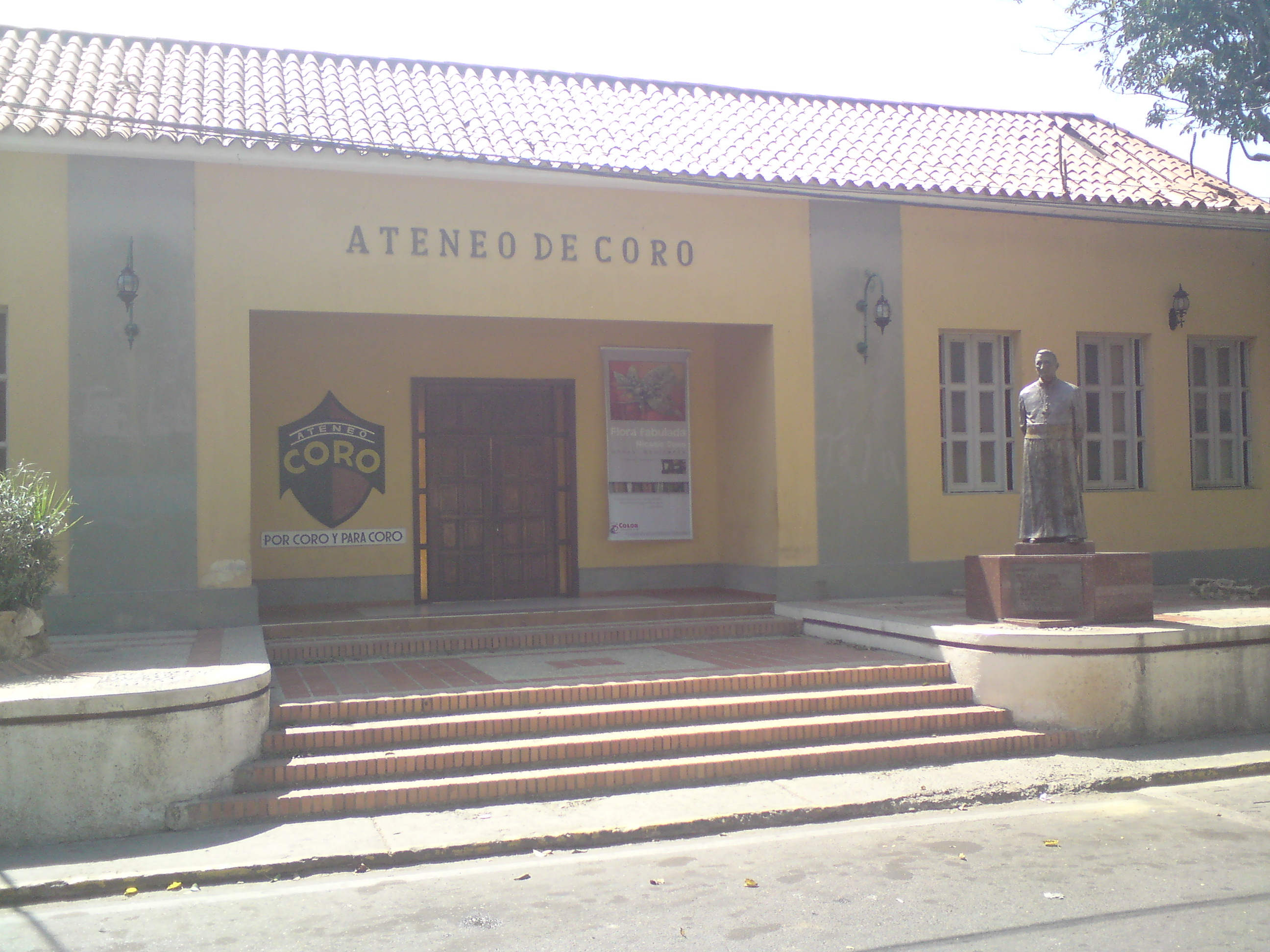 Ateneo de Coro.